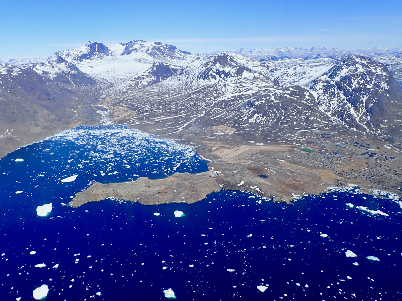 Vue aérienne de la commune de Narsaq, à l'extrème sud du Groenland.